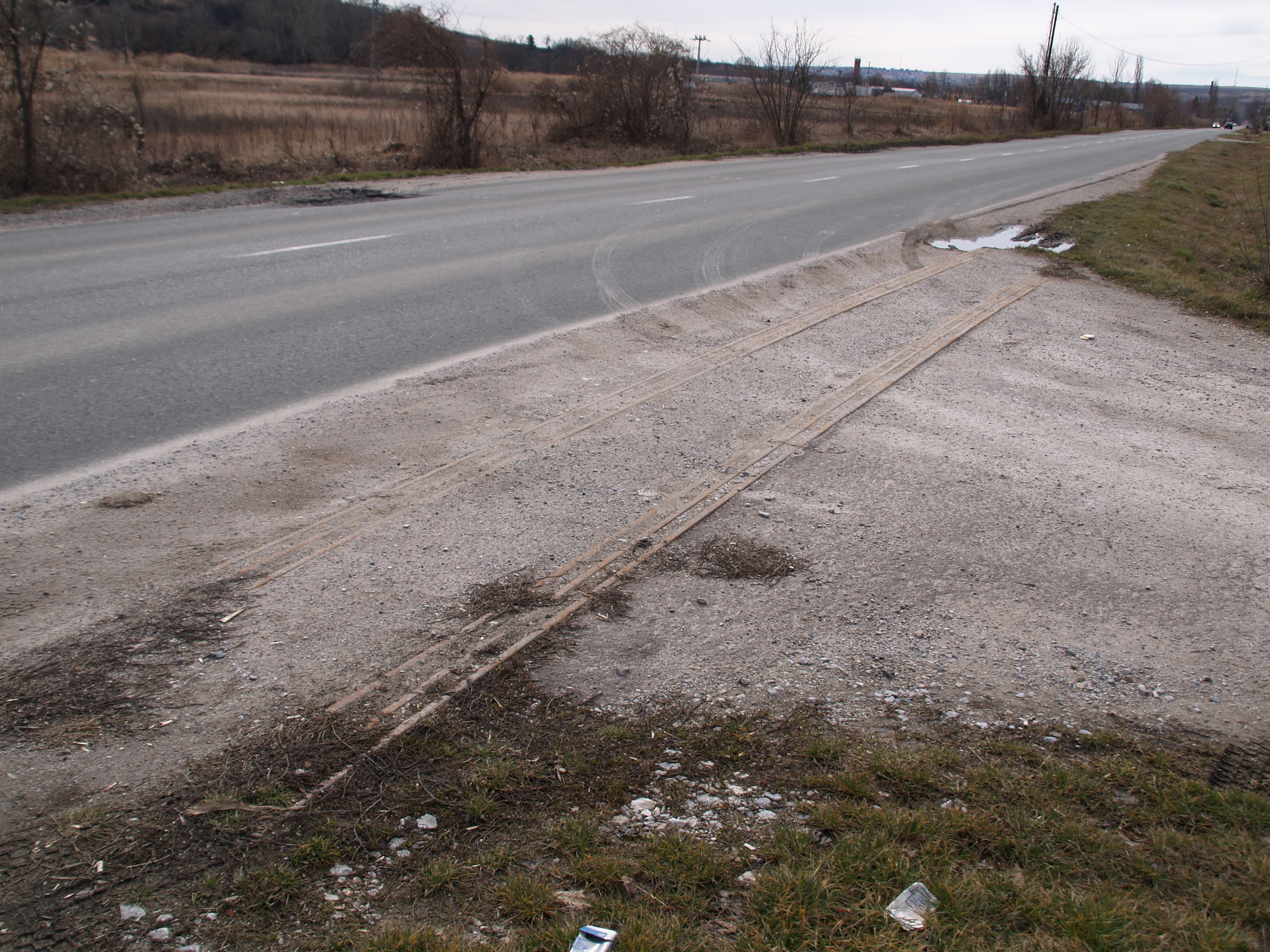 A Felsőtárkányi Állami Erdei Vasút Eger-Felsőtárkány közti vonalmaradványa, Felnémet